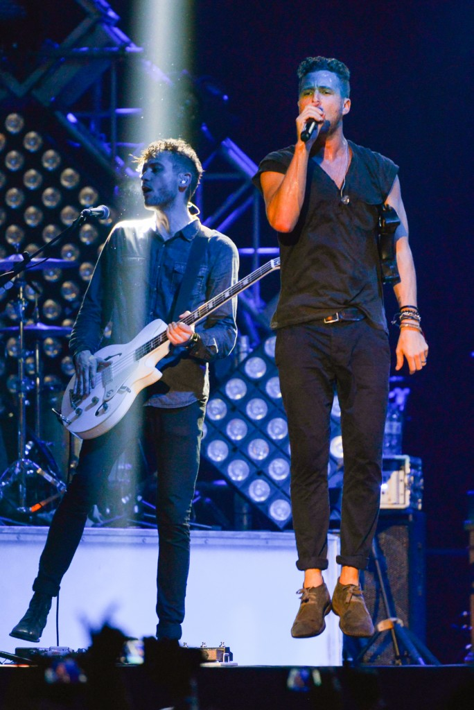 Singer Ryan Tedder and bassist Brent Kutzle during a show